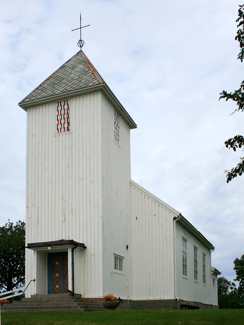 Rørvik church, Vikna, Nord-Trøndelag, Norway.